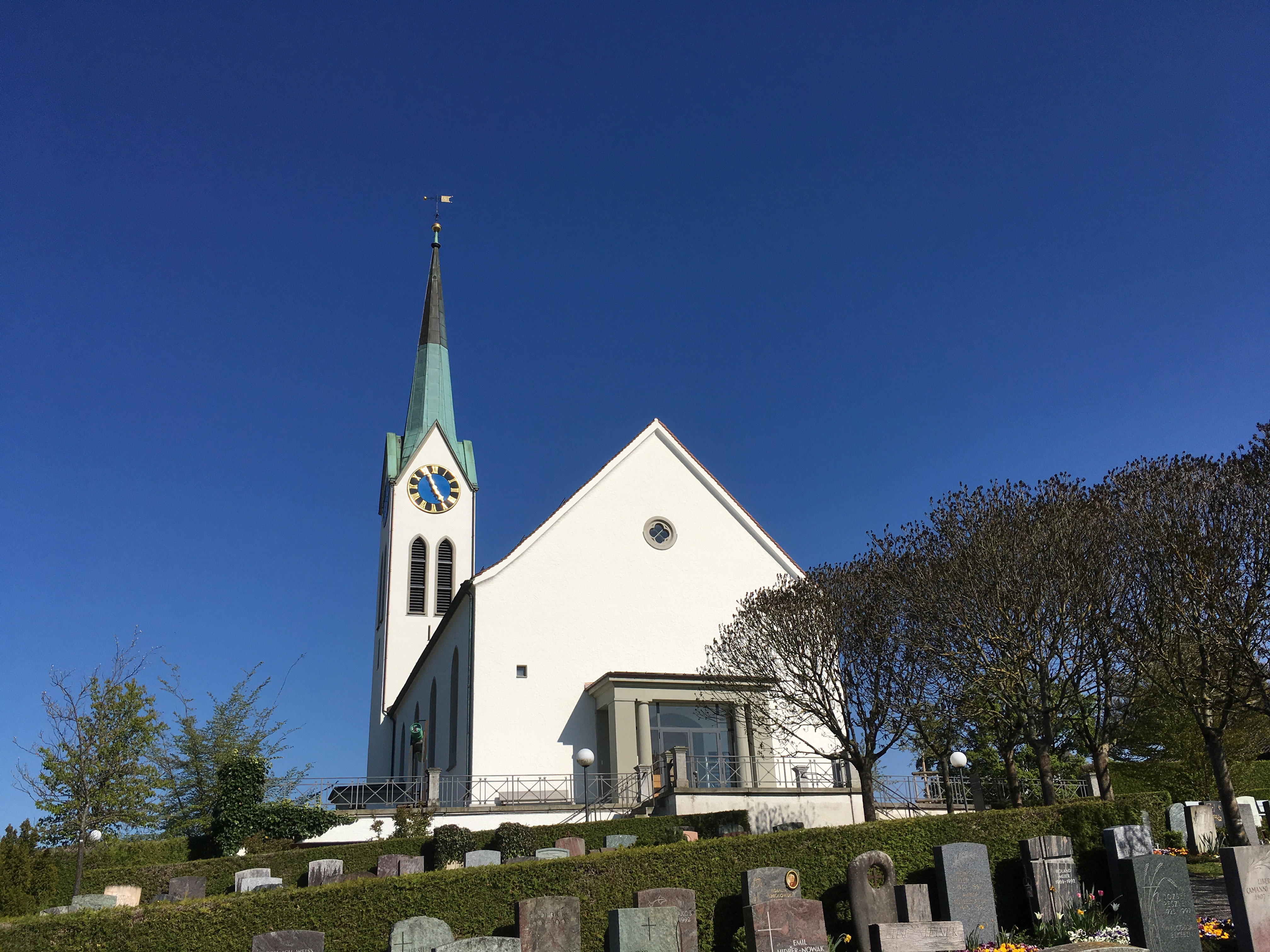 Reformierte Kirche Seen, Winterthur, von Westen